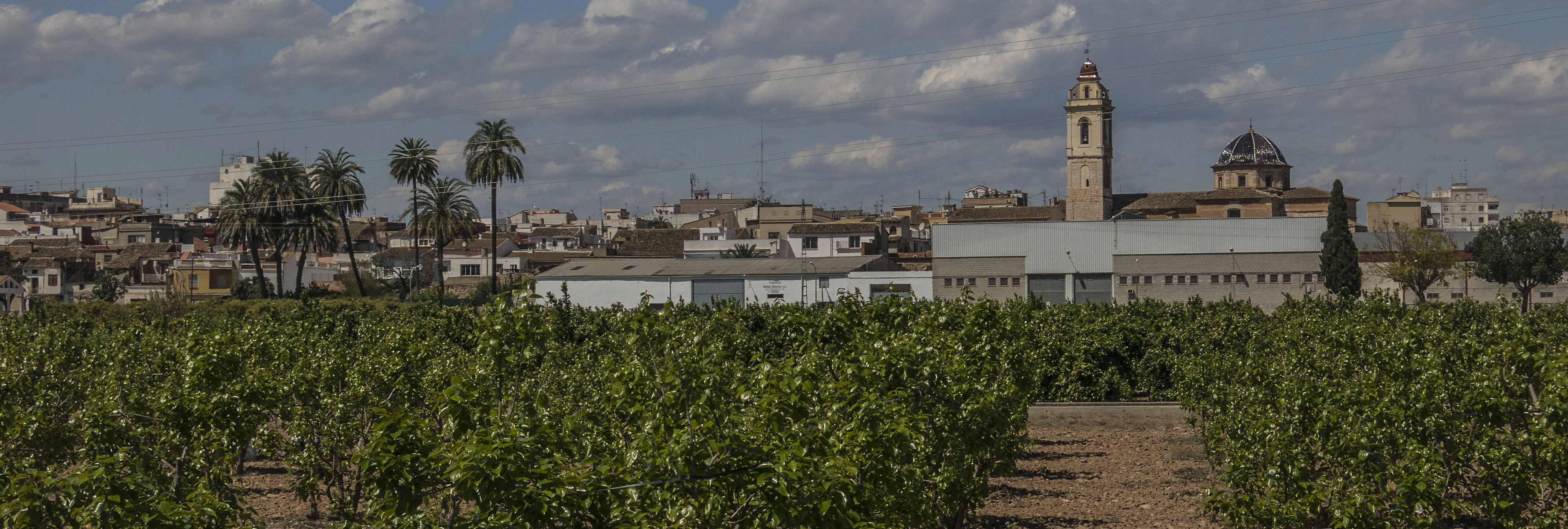 Alberic és un municipi del País Valencià, situat a la comarca de la Ribera Alta.